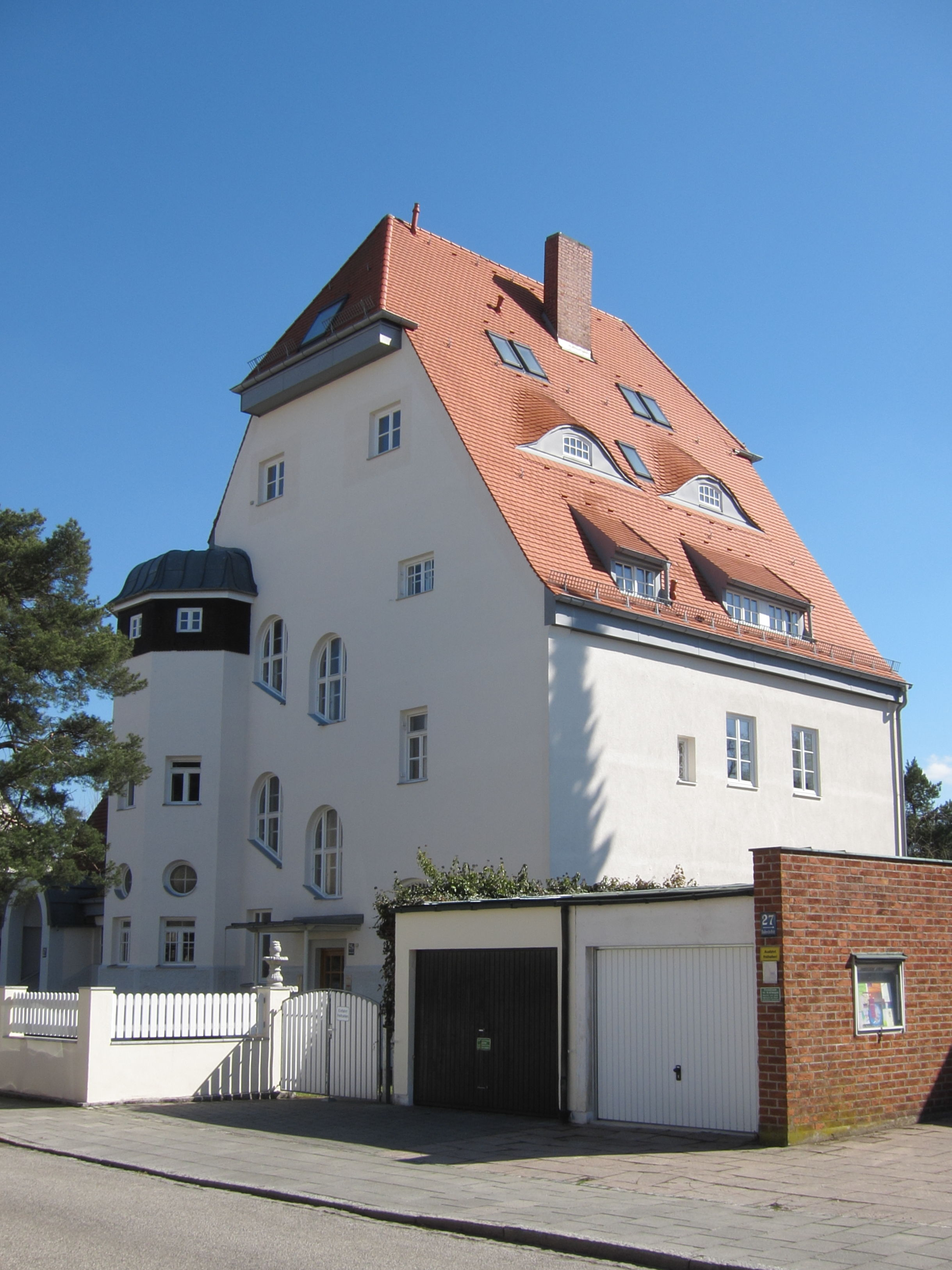 Bodenstedtstraße 25; Wohnhaus, stattlicher Gruppenbau mit Halbwalmdach und turmartiger Erweiterung, 1903–06 nach Plänen der Gebrüder Rank.